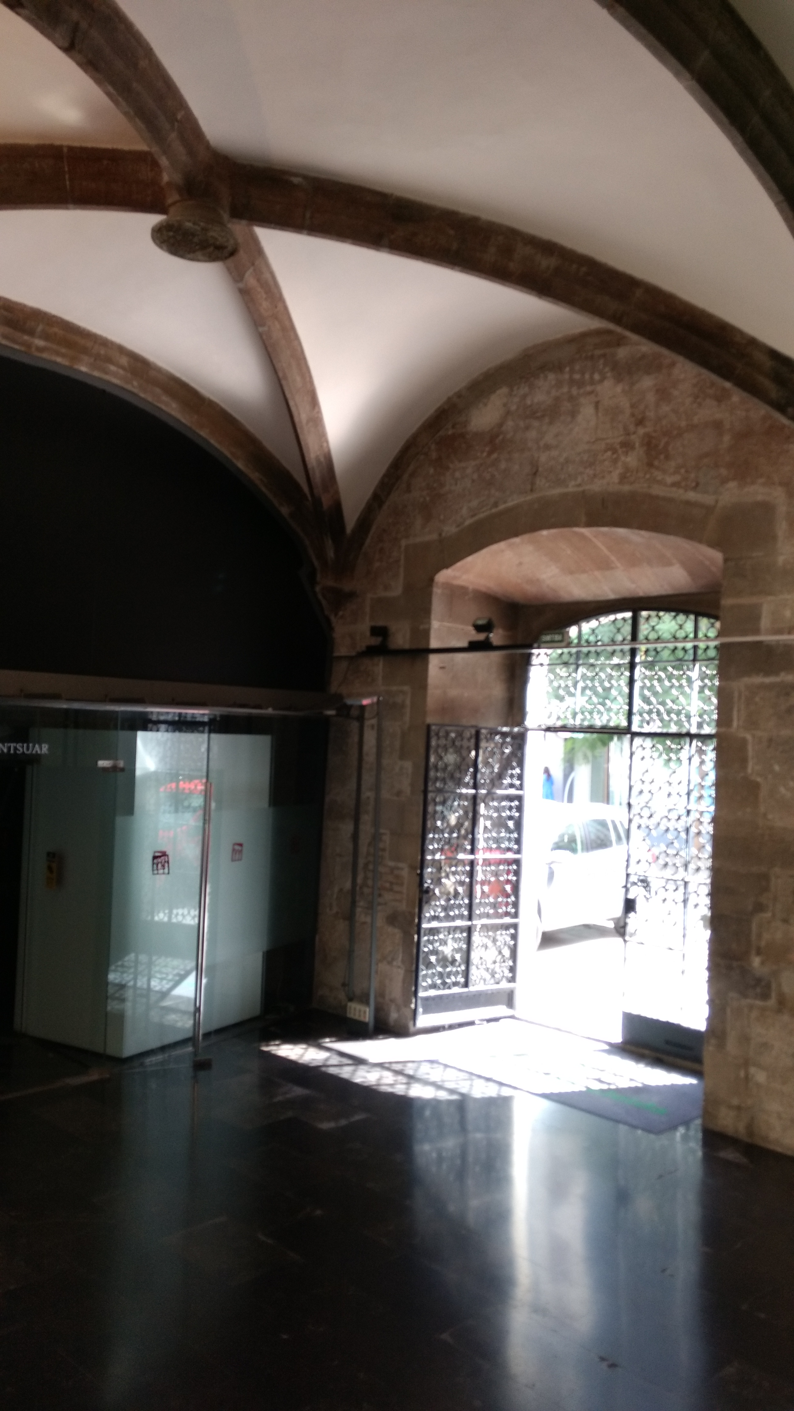 Hospital de Santa María de Lleida Ingreso sur